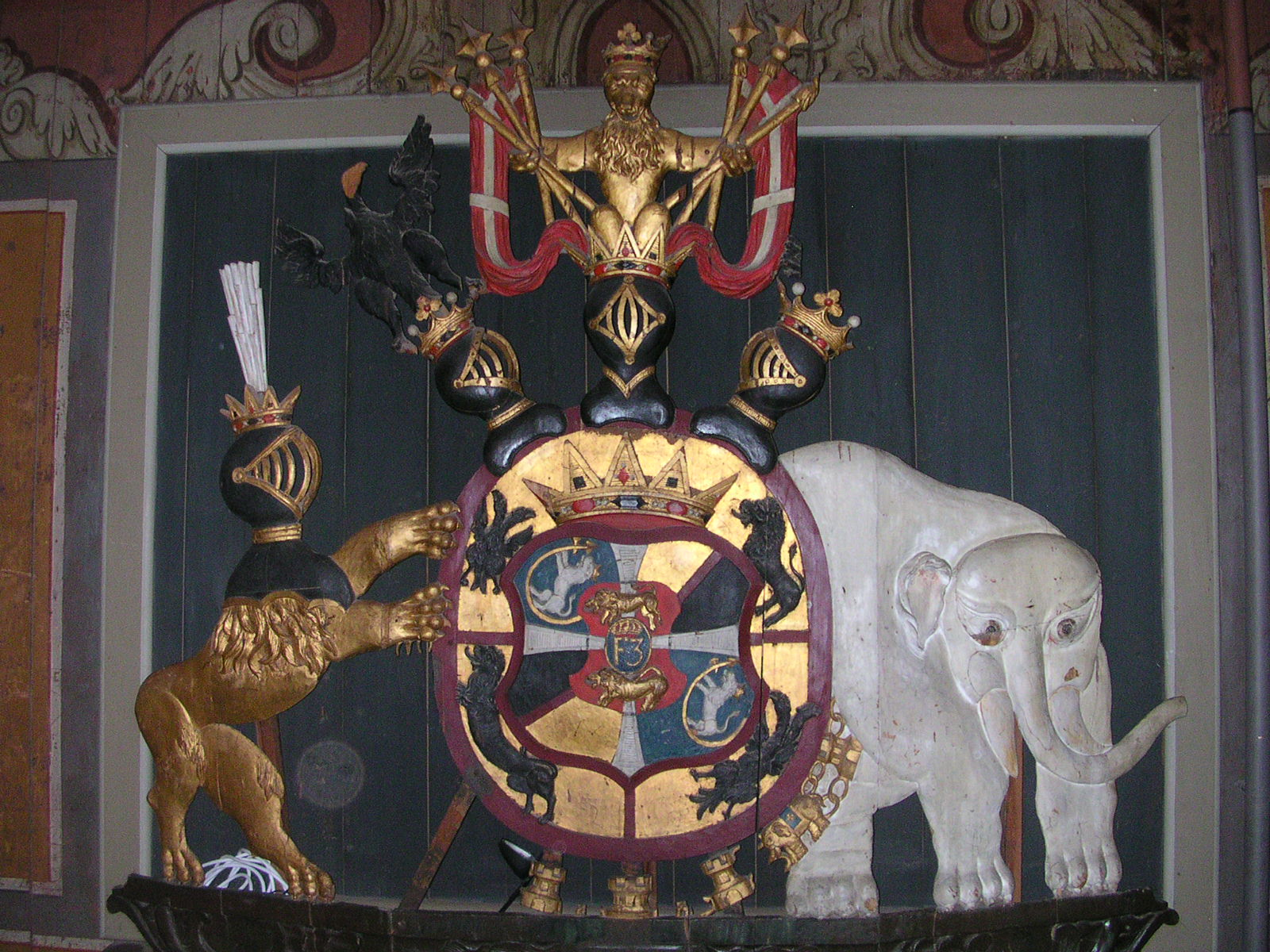 Våpenskjold Ferdinand Anton Danneskiold-Laurvig i Herregården i Larvik. Dette stod tidligere i Larvik kirke.